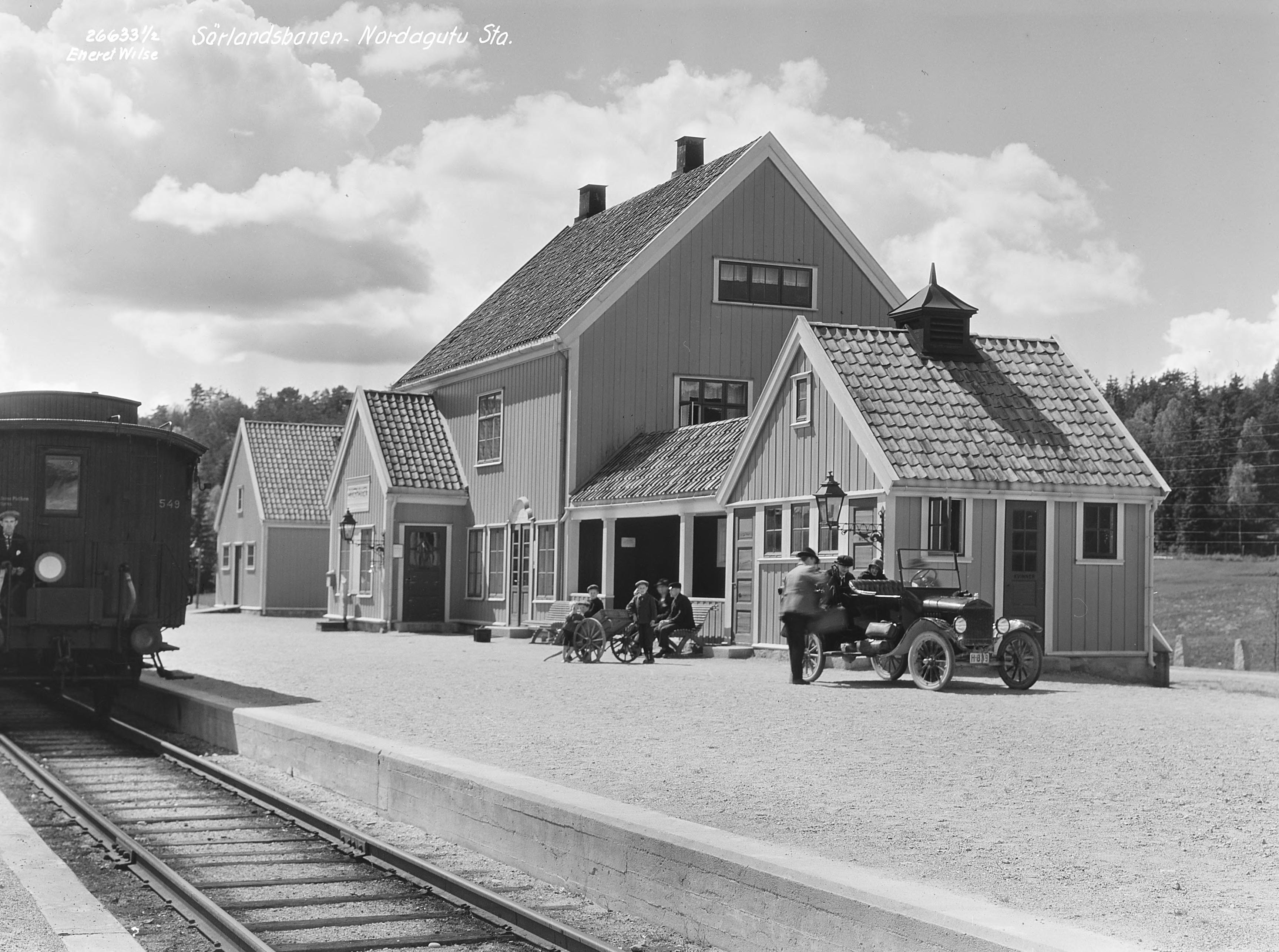 Akkerhaugen stasjon i 1925. Foto: Anders Beer Wilse.